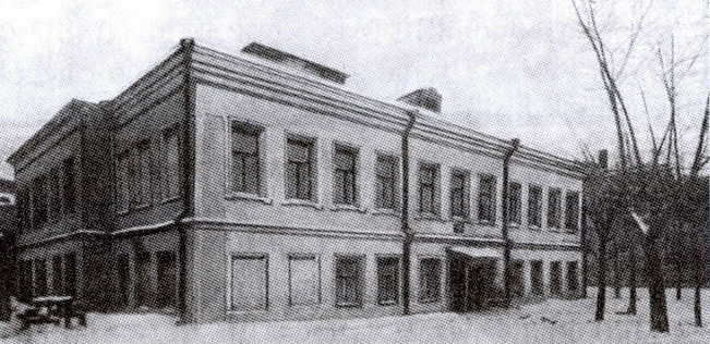 Ректорский Дом — здание Императорского Московского университета на Моховой, в котором размещались квартиры ректоров и профессоров Московского университета.